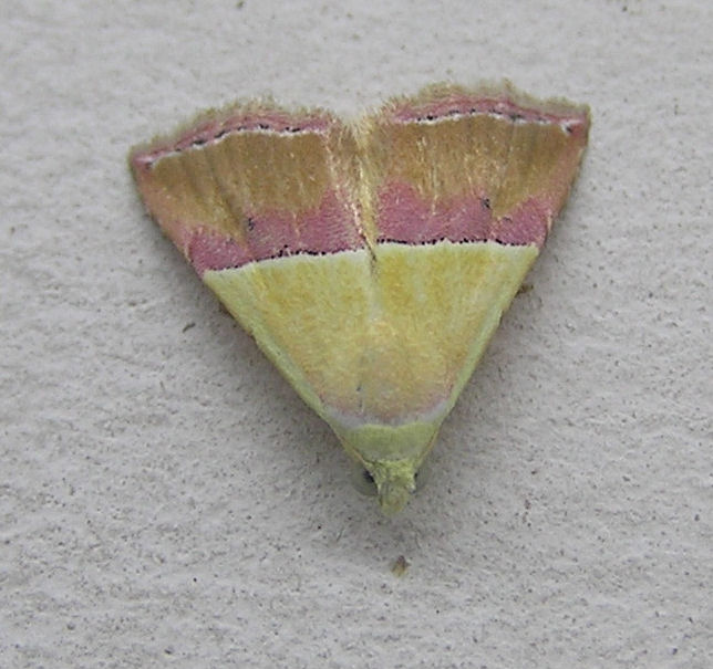 Eublemma anachoresis (Noctuidae, Eublemminae)